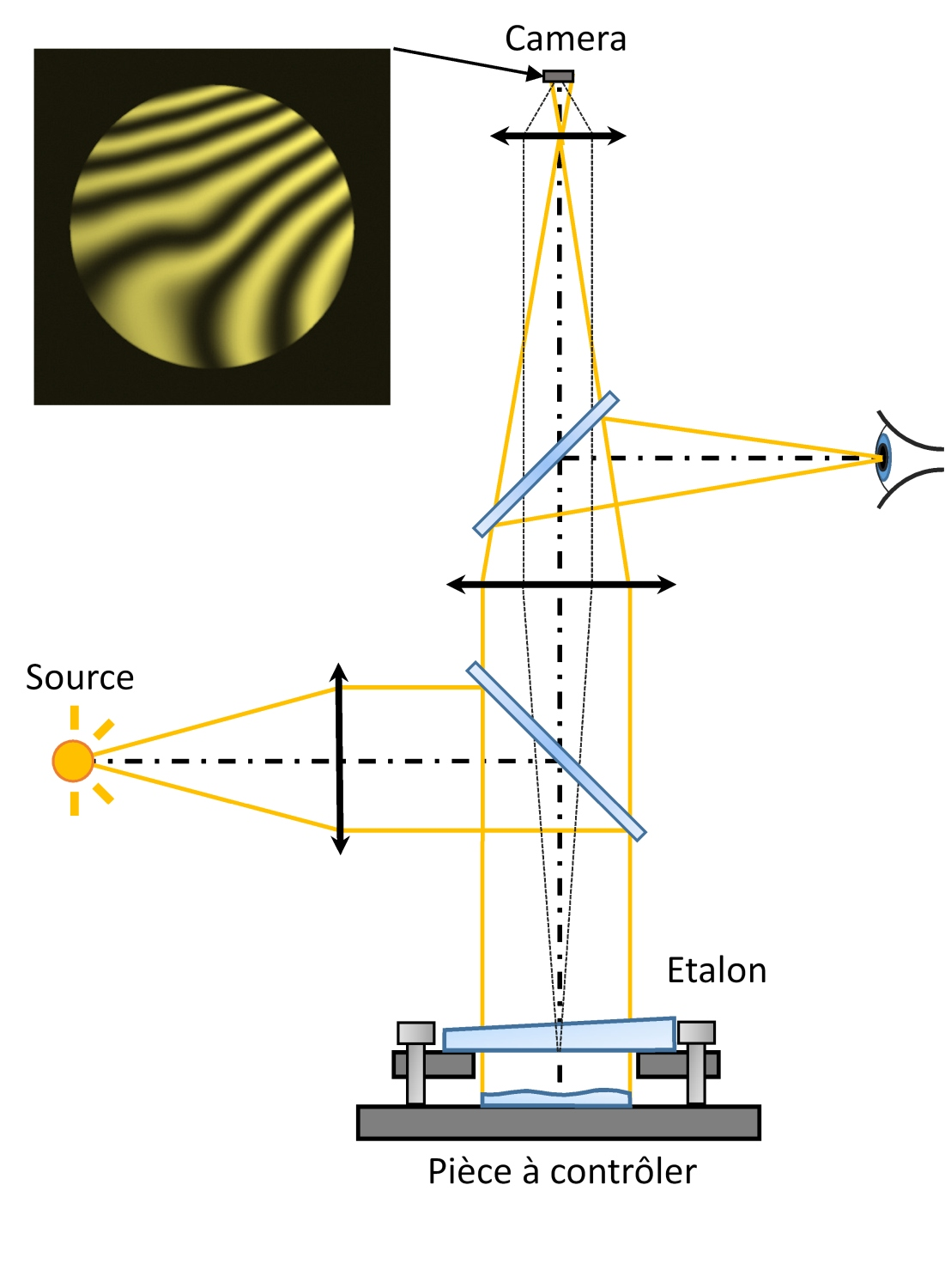 Schéma d'un interféromètre de Fizeau, dans le montage proposé par A. Arnulf et M. Cagnet.